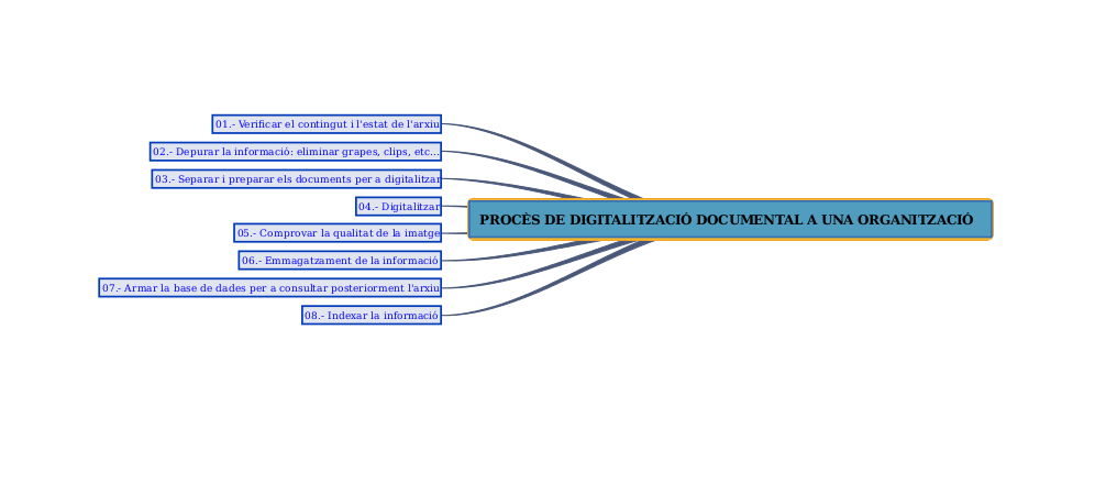 Pasos del procès en la digitalització documental